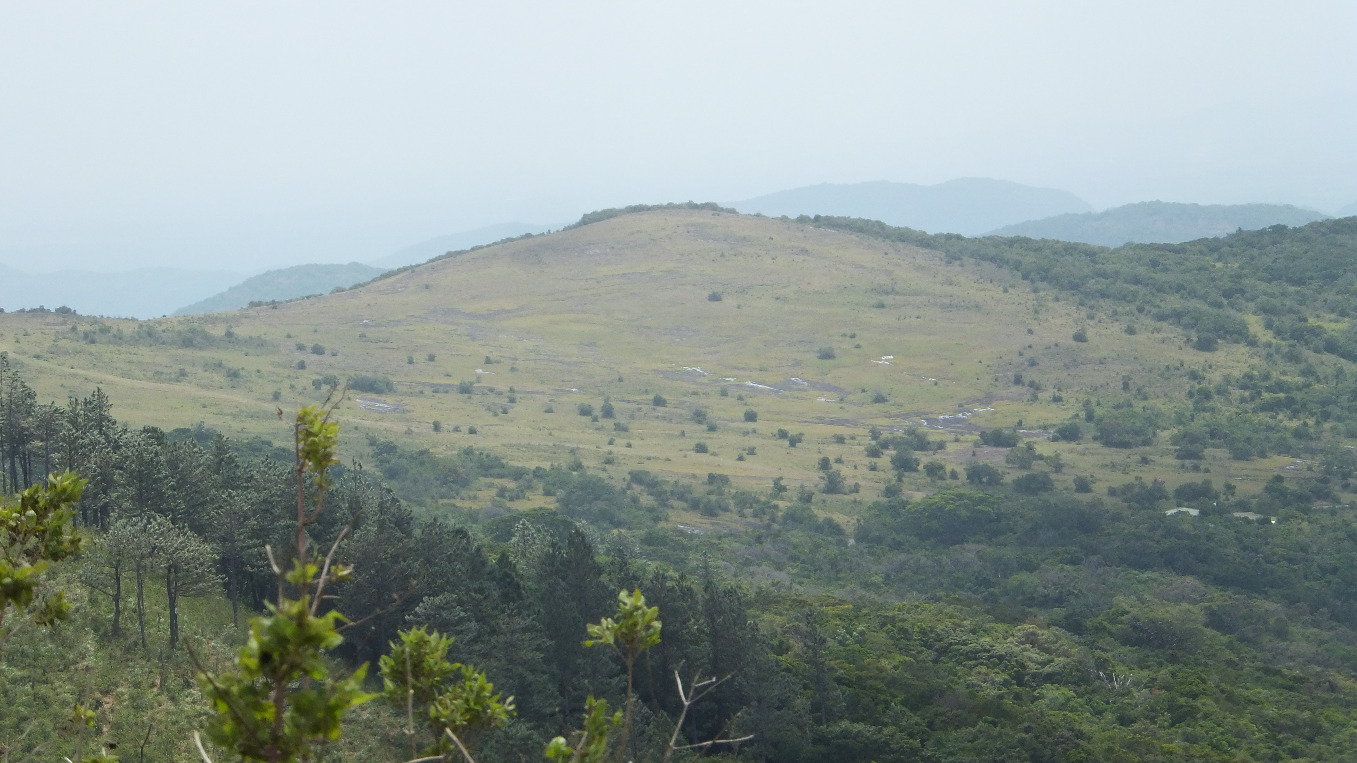 සිංහල: පිටවල පතන